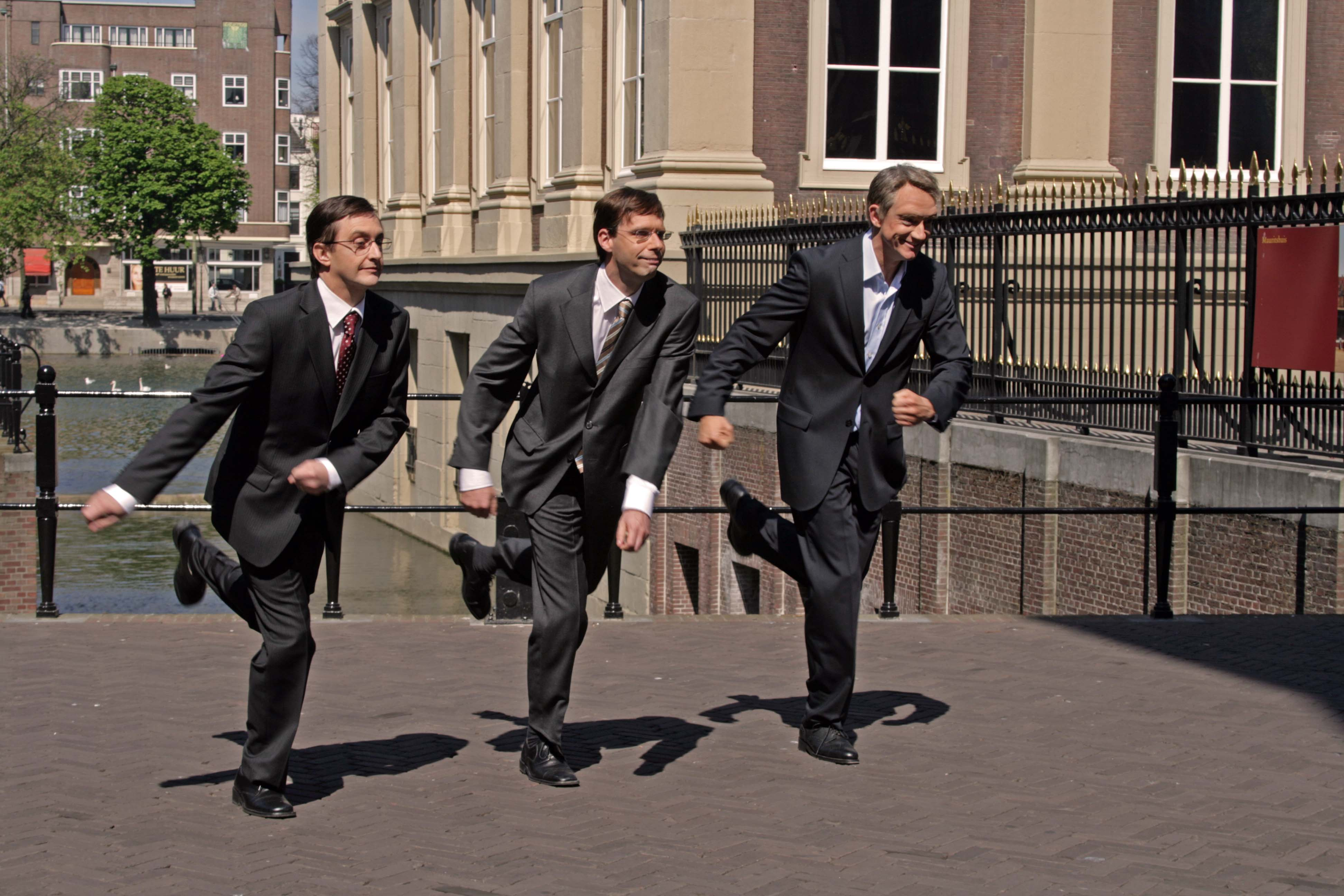 Koefnoen-satire met drie "ministers" die jumpstyle doen. Zie ook de clip (geen screenshot). v.l.n.r. worden André Rouvoet, Jan Peter Balkenende en Wouter Bos nagedaan. Op de achtergrond het Mauritshuis aan de rechterkant - aan de linkerkant het Torentje.